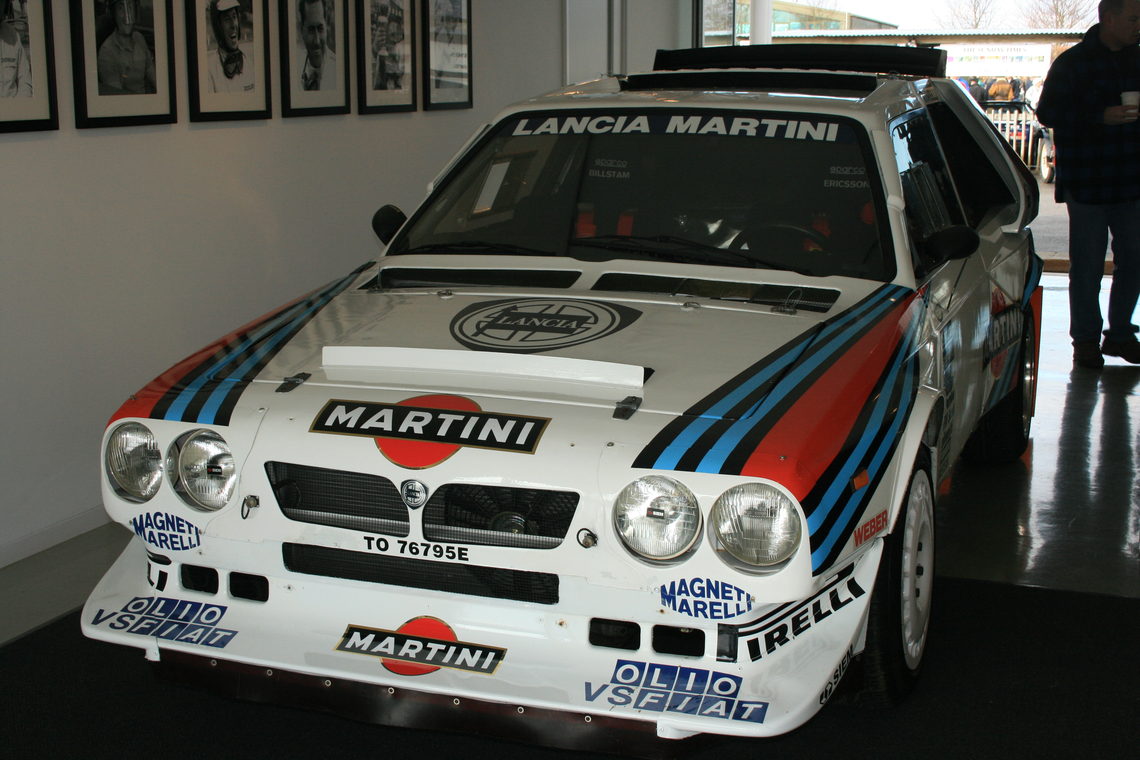 Group B Lancia Integrale S4